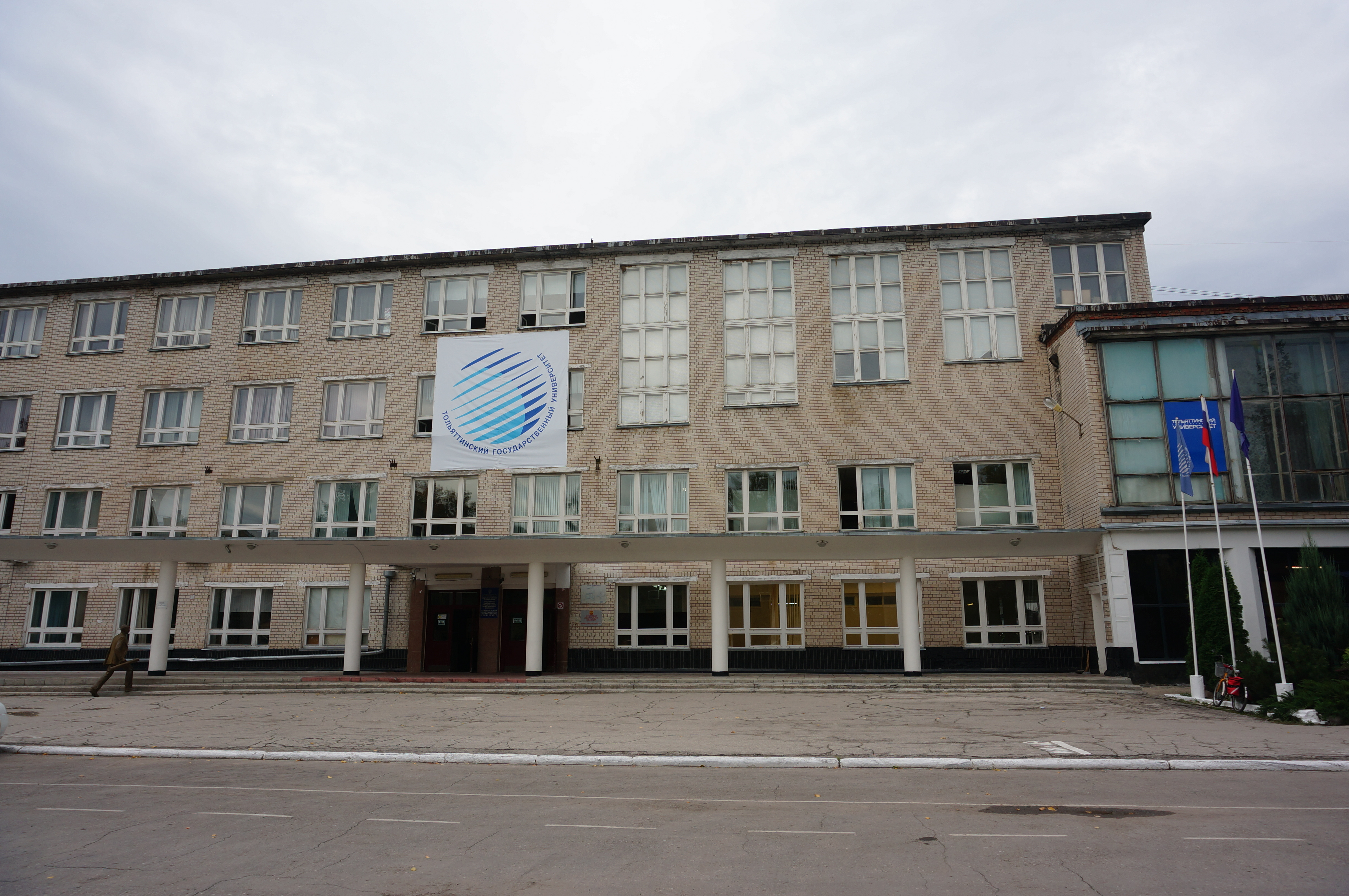 Одно из зданий Тольяттинского государственного университета